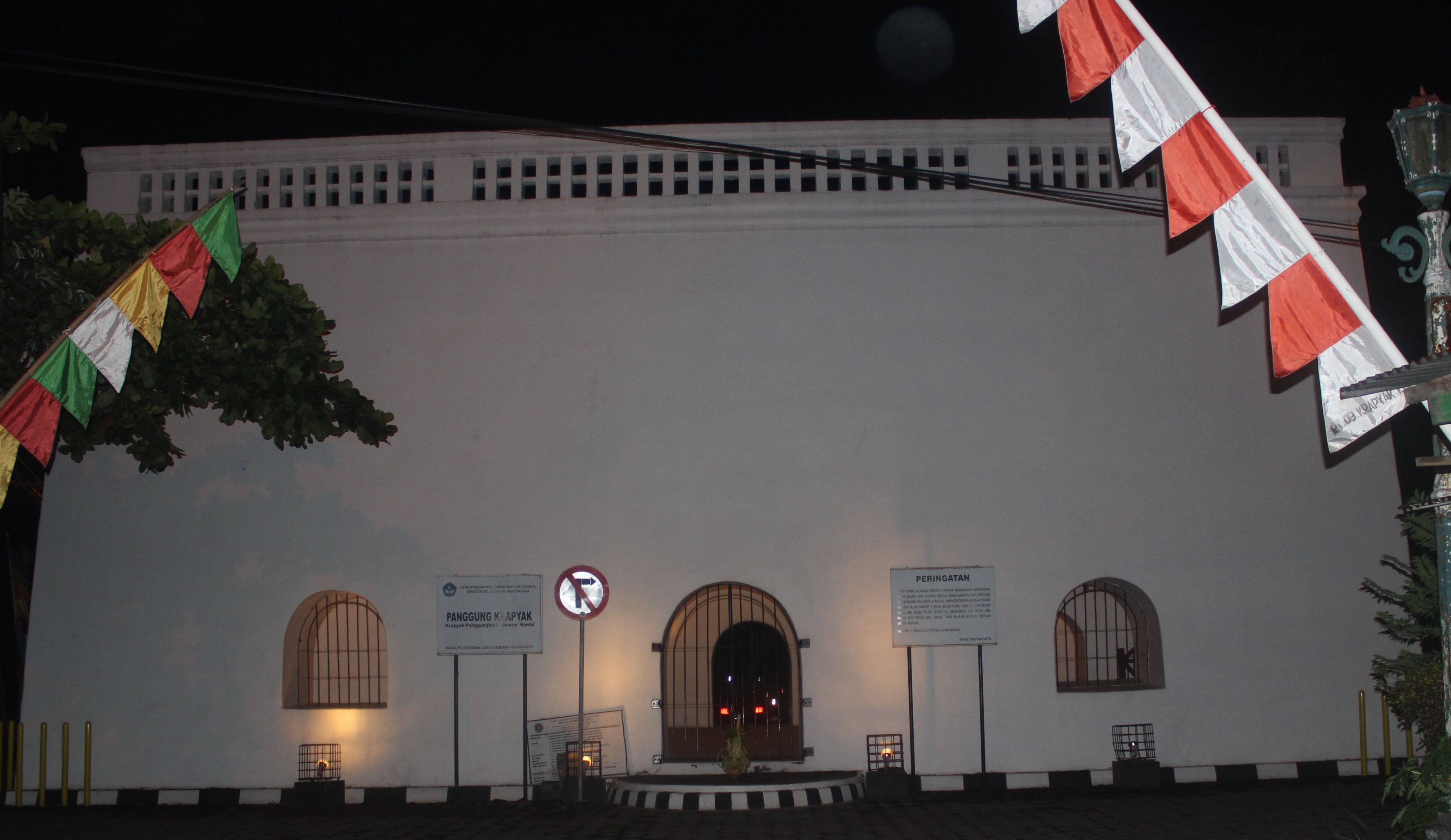 Panggung Krapyak tampak dari utara pada malam hari.